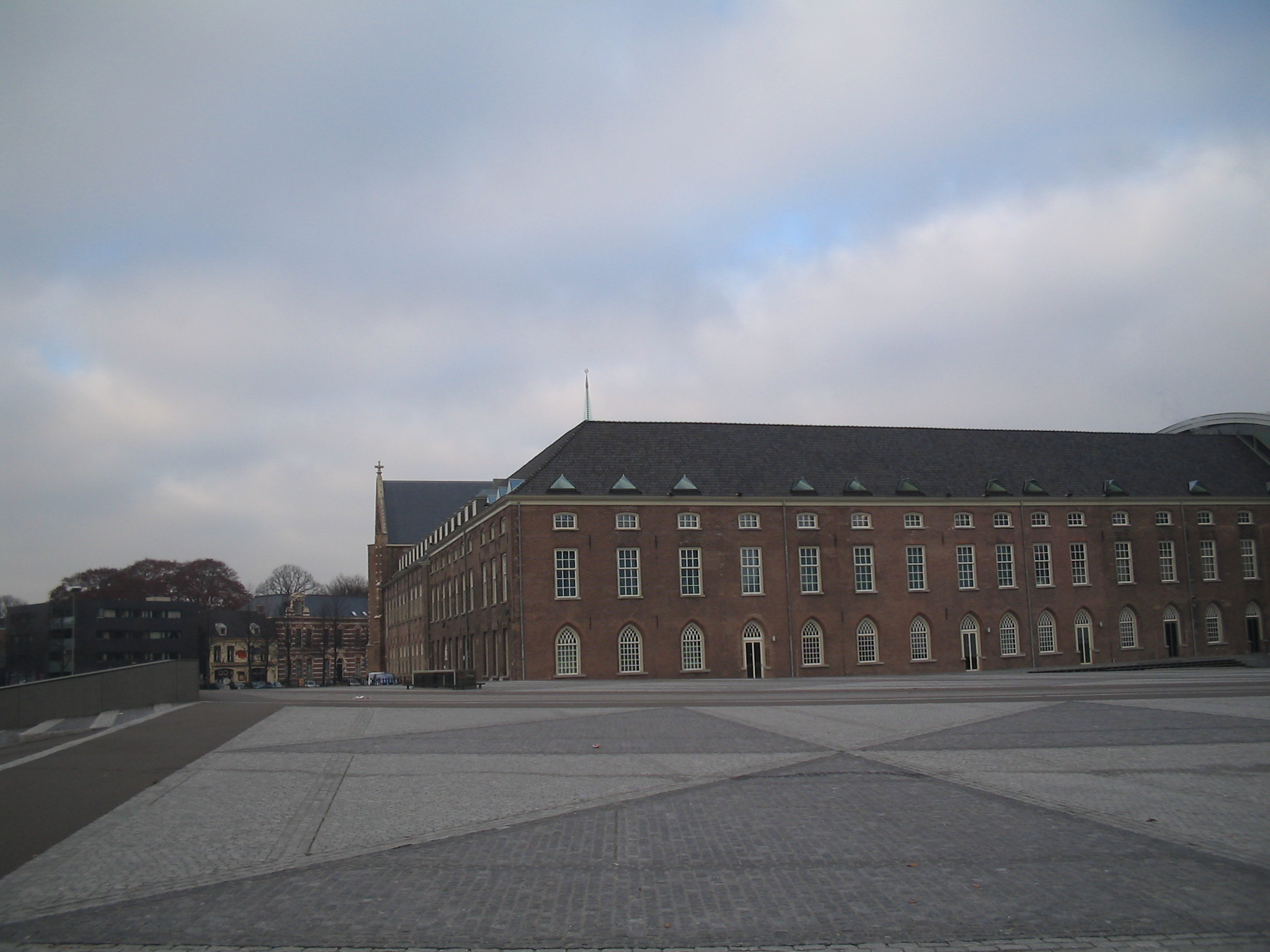 Kloosterkazerne,Breda, dec. 2005